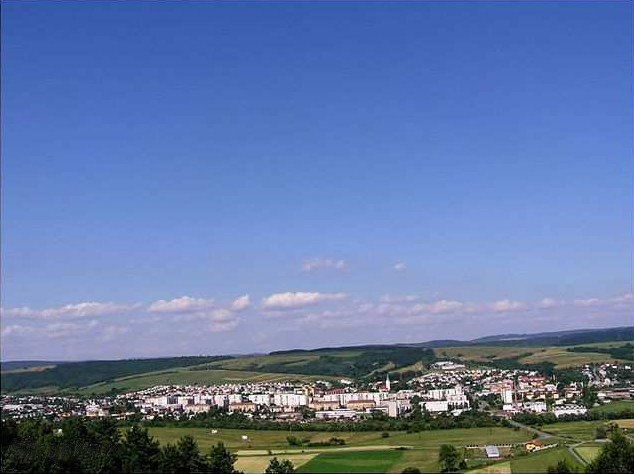 Pohľad na Stropkov zo západu